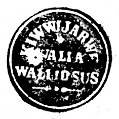 Kivijärve vallavalitsuse pitsat. Üleslaadija koopia ja töötlus